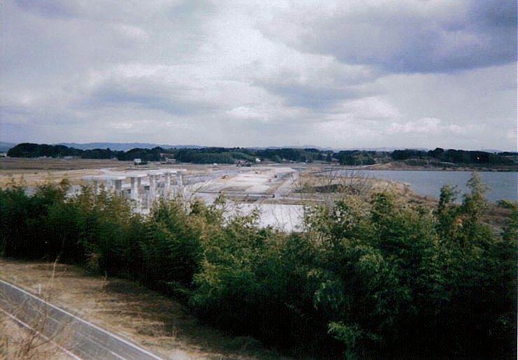 Dam